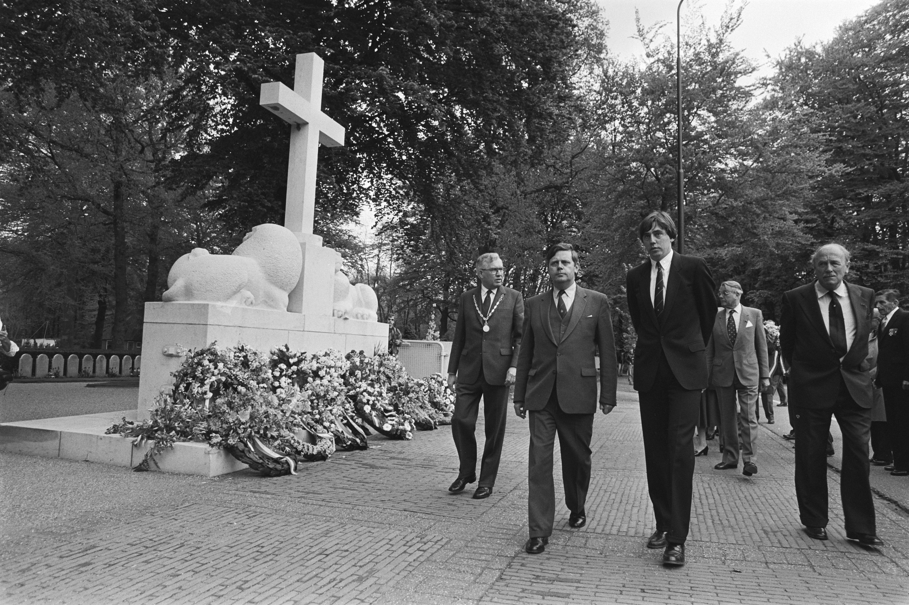 Collectie / Archief : Fotocollectie Anefo Reportage / Serie : [ onbekend ] Beschrijving : Herdenkingsbijeenkomst bij Grebbebergmonument; v.r.n.l. oud-Kamerlid Maarten Schakel, VVD-fractieleider Ed Nijpels, staatssecretaris Willem Hoekzema en burgemeester Jacob Schoonderbeek Datum : 10 mei 1984 Locatie : Rhenen, Utrecht (provincie) Trefwoorden : herdenkingsbijeenkomsten, oorlogsmonumenten Persoonsnaam : Grebbebergmonument, Hoekzema, Willem, Nijpels, Ed, Schakel, Schakel, Maarten, Schoonderbeek, J. Fotograaf : Antonisse, Marcel / Anefo, [onbekend] Auteursrechthebbende : Nationaal Archief Materiaalsoort : Negatief (zwart/wit) Nummer archiefinventaris : bekijk toegang 2.24.01.05 Bestanddeelnummer : 932-9641